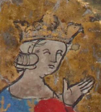 marie brabantská